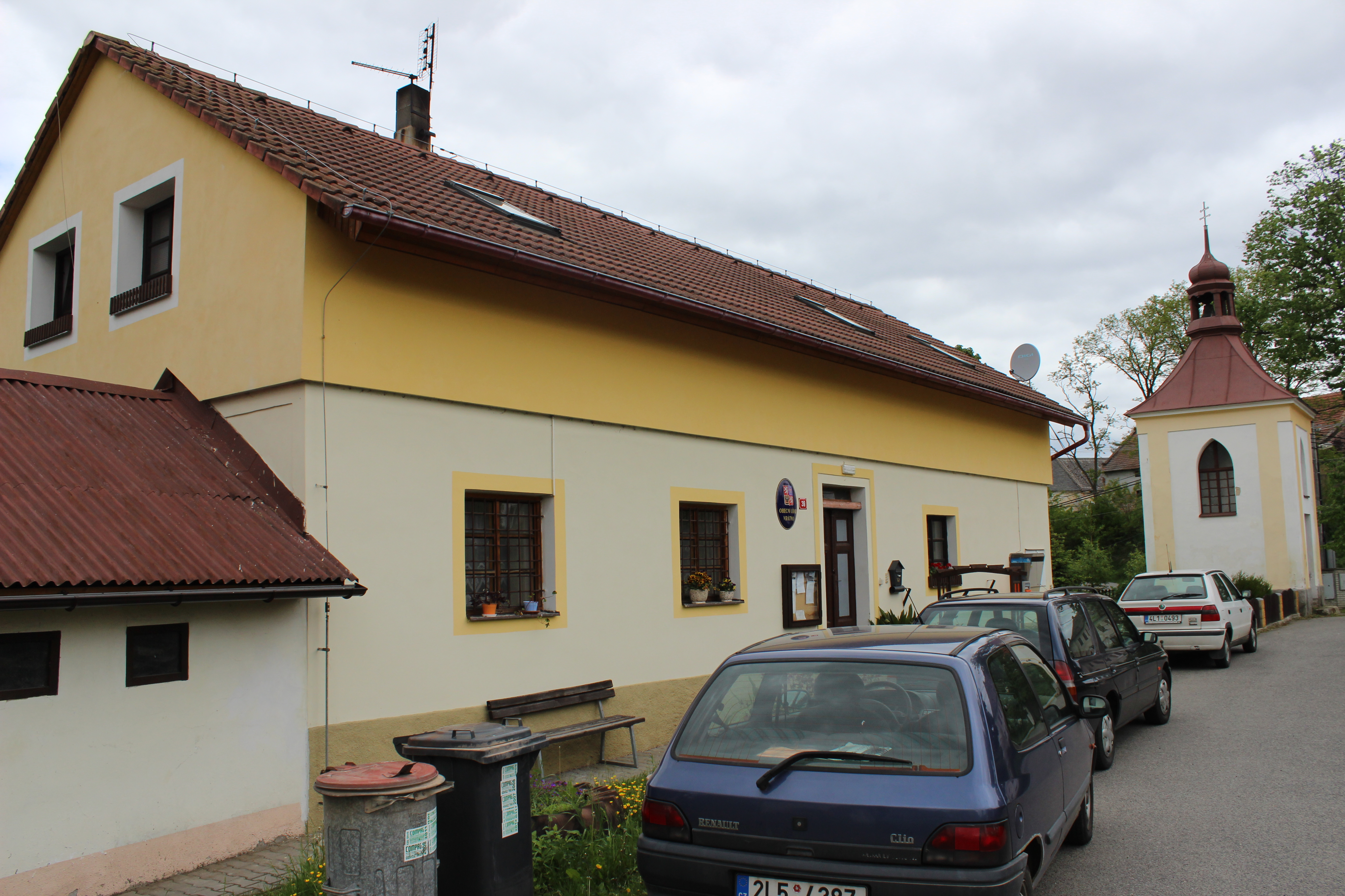 Vrátno, obecní úřad a kaplička. Project: Fotíme Česko.